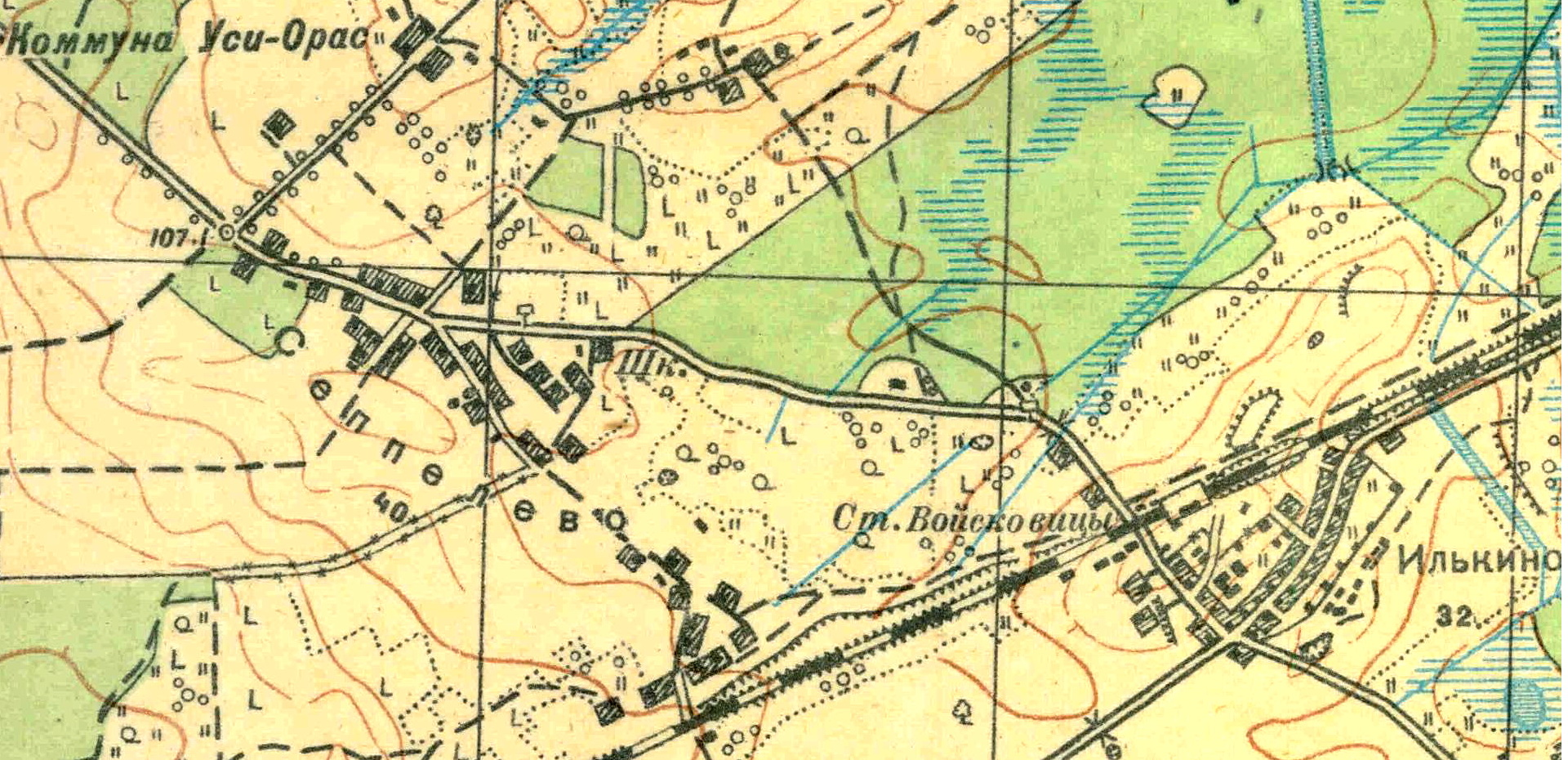 Топографическая карта Ленинградской области, квадрат О-35-24-Б-г (Б. Борницы), посёлок Войсковицы